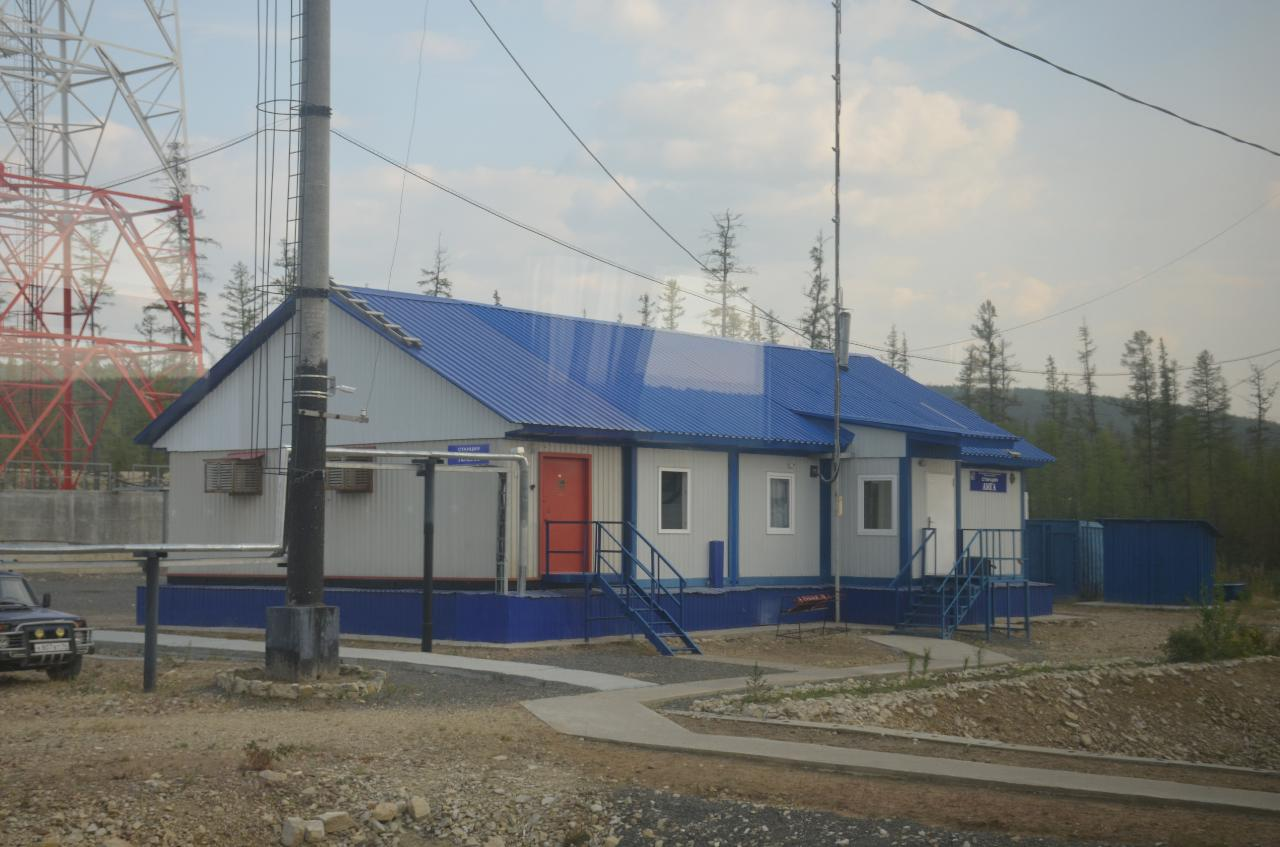 Поездка 5-6 августа 2019 г. по маршруту Якутск - Нерюнгри - Якутск во вновь назначенном поезде № 327 Нижний Бестях - Нерюнгри. Историческое событие - пуск пассажирского движения поездов из центральной Якутии, почти из Якутска. Станция Амга (338 км)